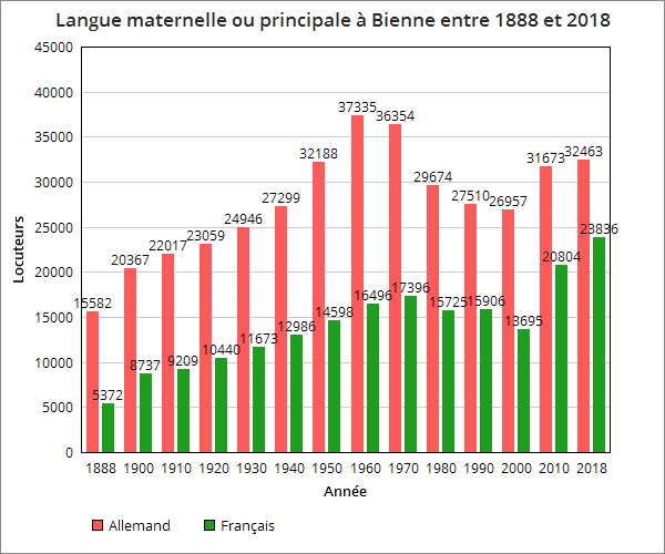 repartition_langues_bienne